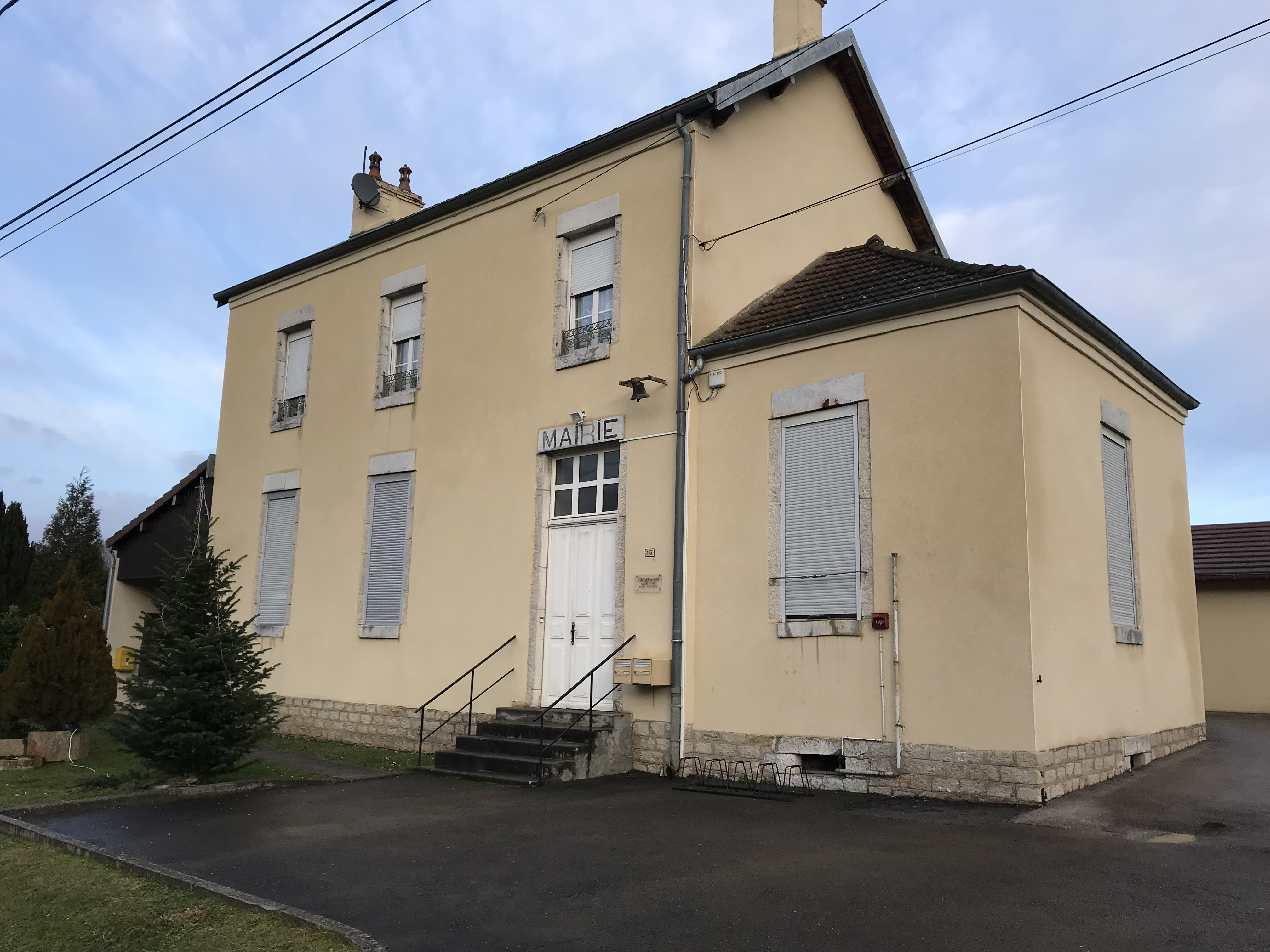 La Bretenière (Jura) en janvier 2018.